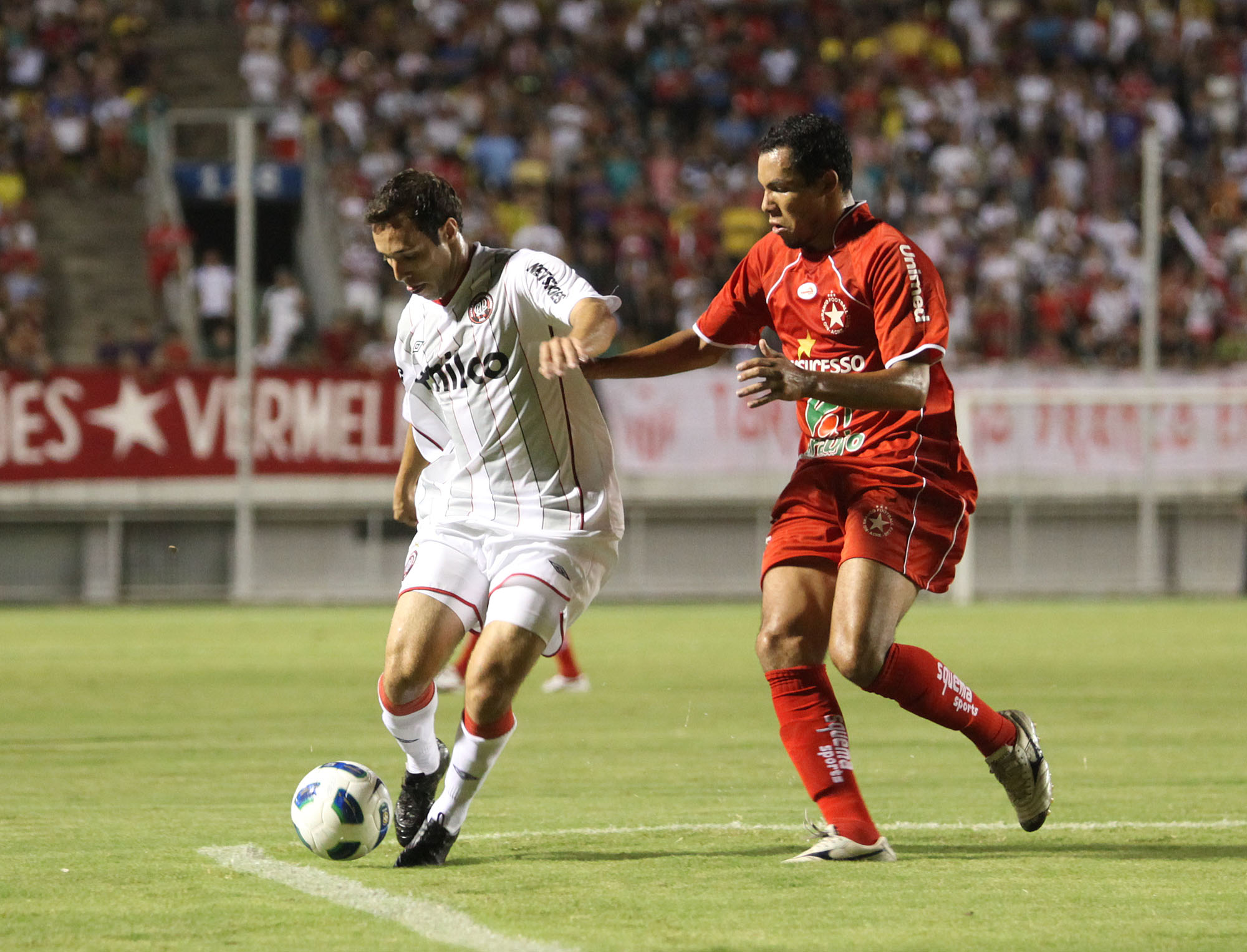 Rio Branco surpreende, joga bem e vence o Atlético Paranaense na Arena da Floresta Rio Branco surpreende, joga bem e vence o Atlético Paranaense na Arena da Floresta